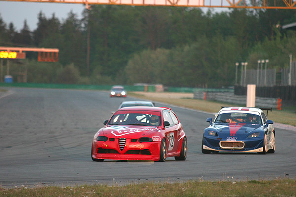 Alfa Romeo 147 GTA